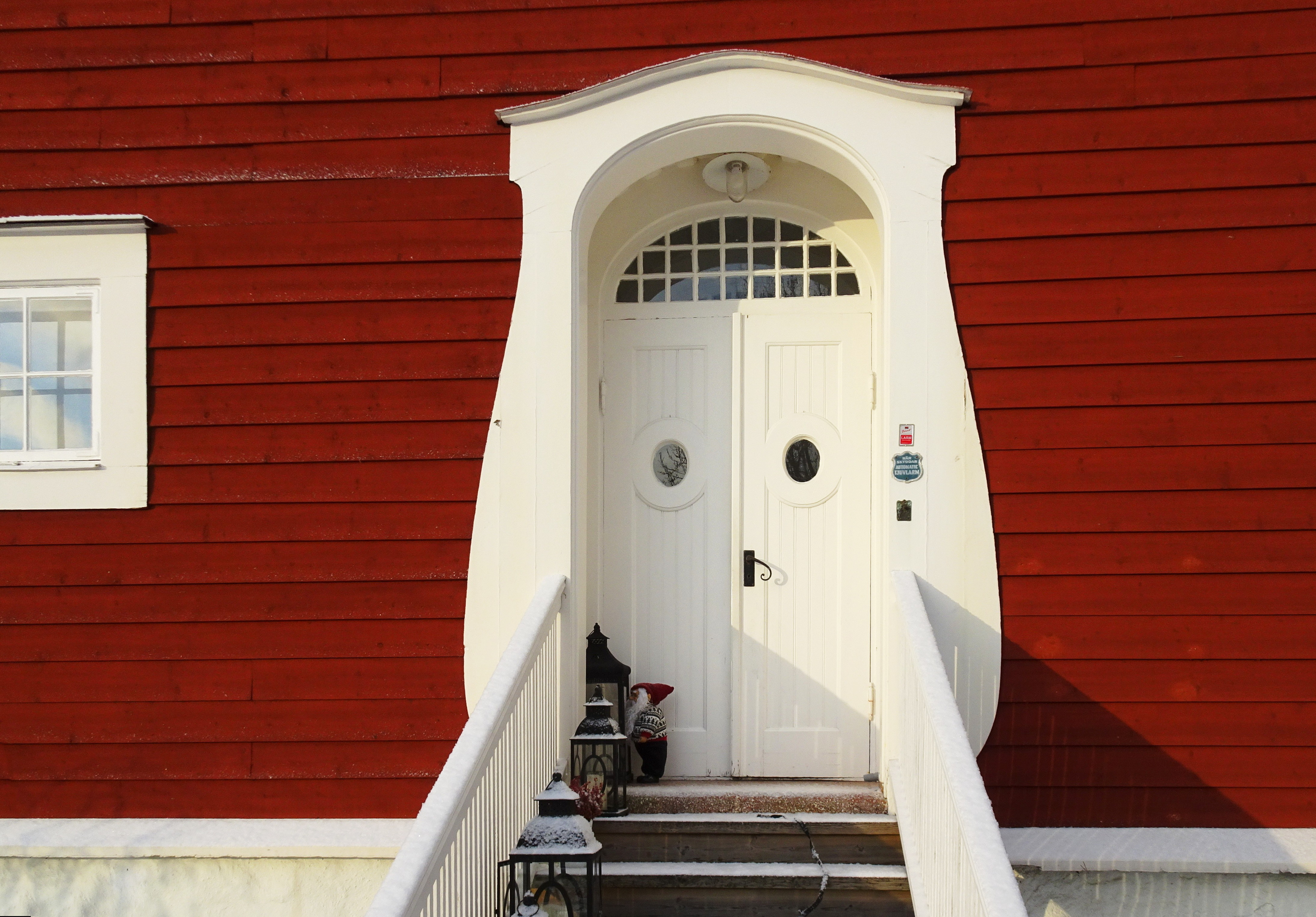 Tammska villan - fasader. Arkitekt Carl Westman. Byggherre Percy Tamm, byggd 1903, Ringvägen 37, Saltsjöbaden